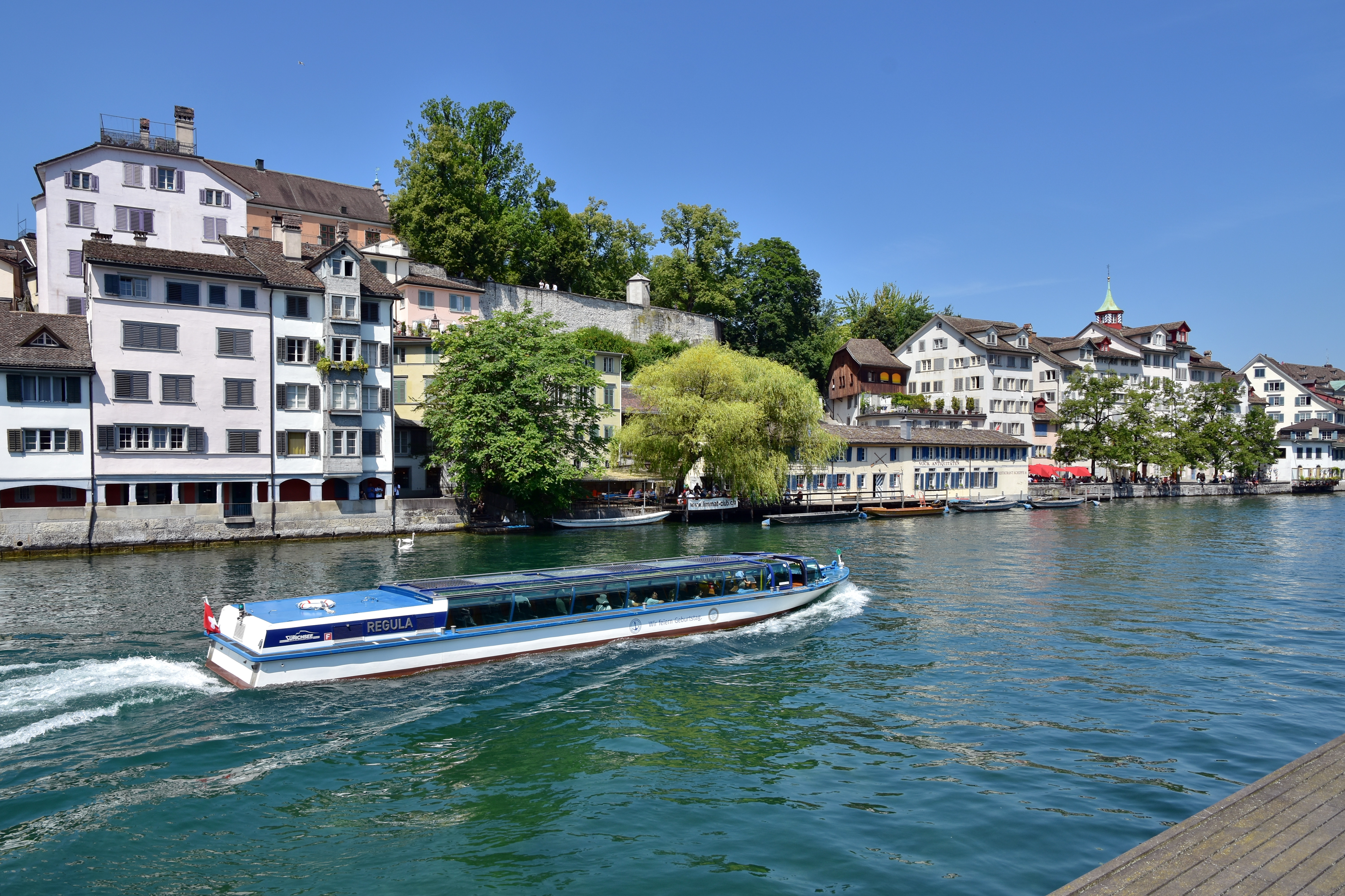 Schipfe and Lindenhof hill at Rathausbrücke (Gmüesbrugg) as seen from Limmatquai in Zürich (Switzerland), Zürichsee-Schifffahrtsgesellschaft (ZSG) Limmat boat Regula driving downstreams Limmat river.